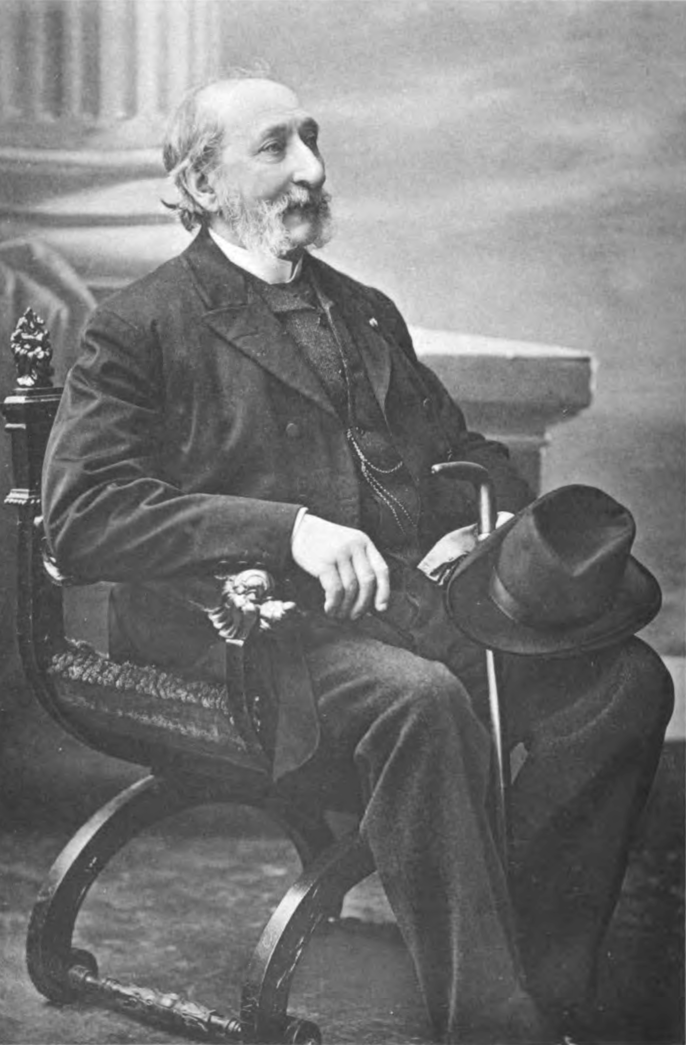 Ivan Zajc (Giovanni Zaytz; 1832–1914), Croatian composer